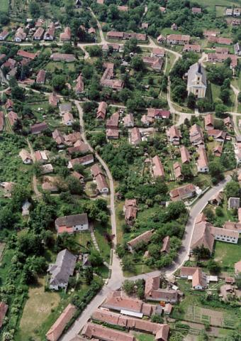 Nagybörzsöny, Hungary, aerialphotography